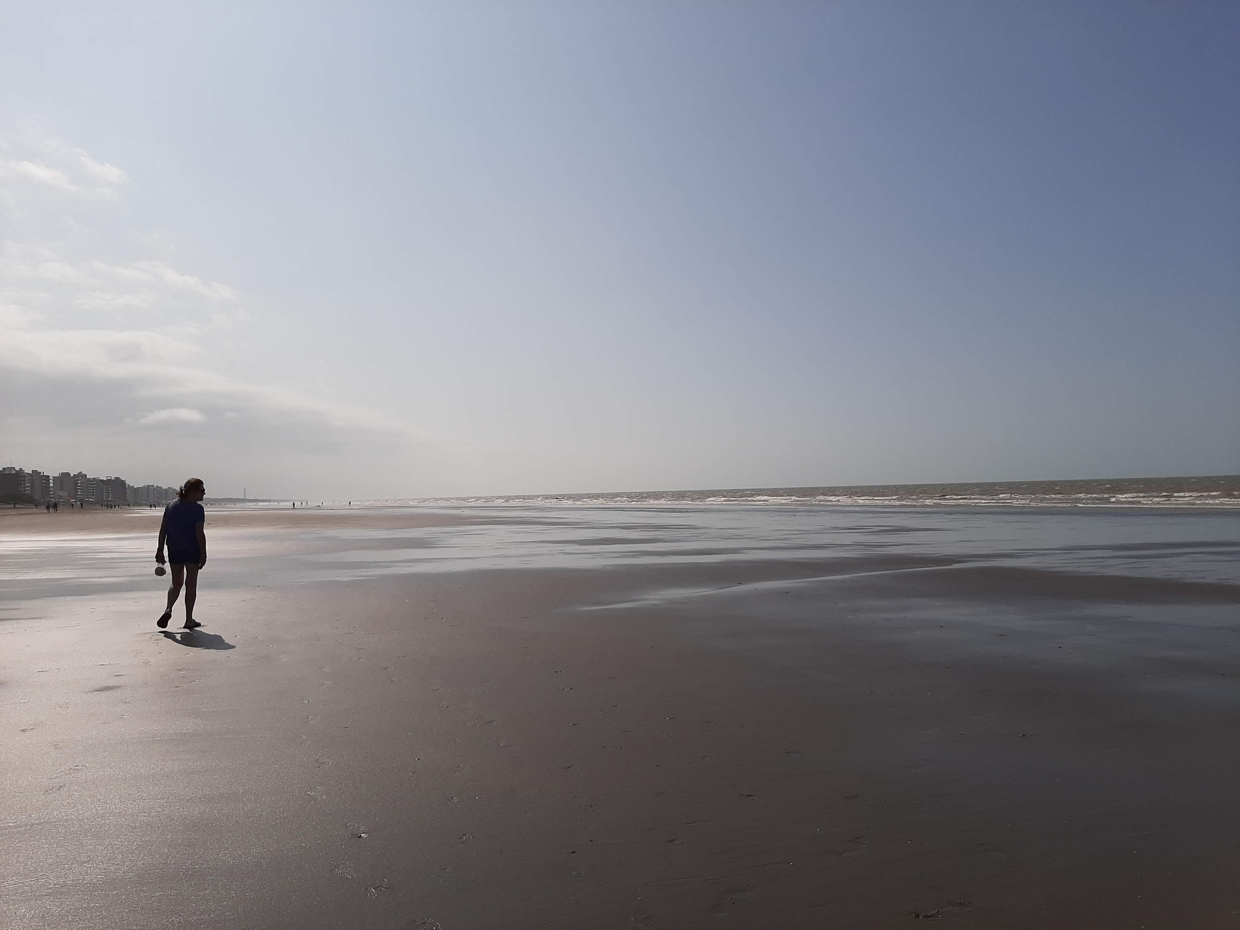 Una de las mejores playas de la Argentina